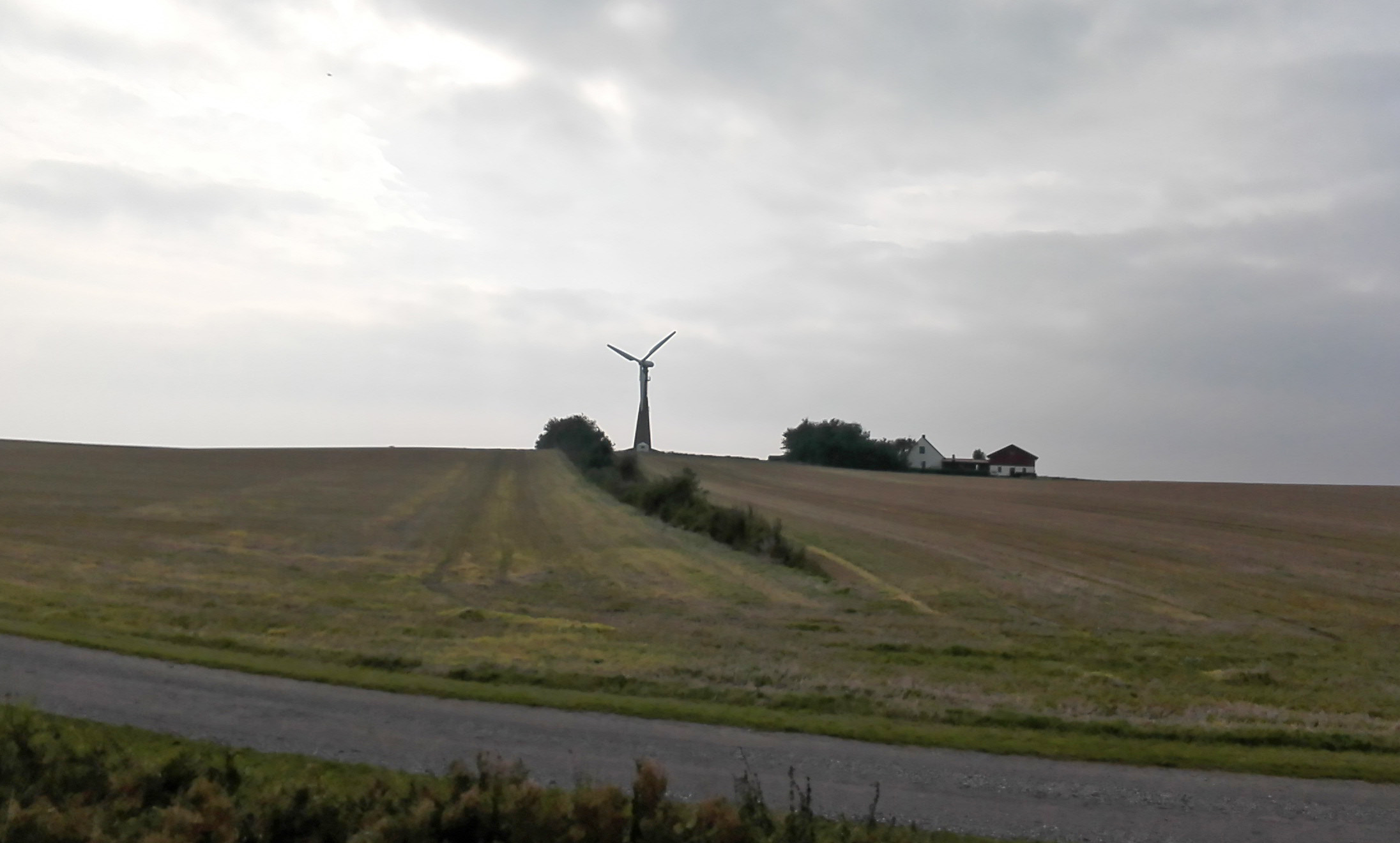 Gedsermøllen